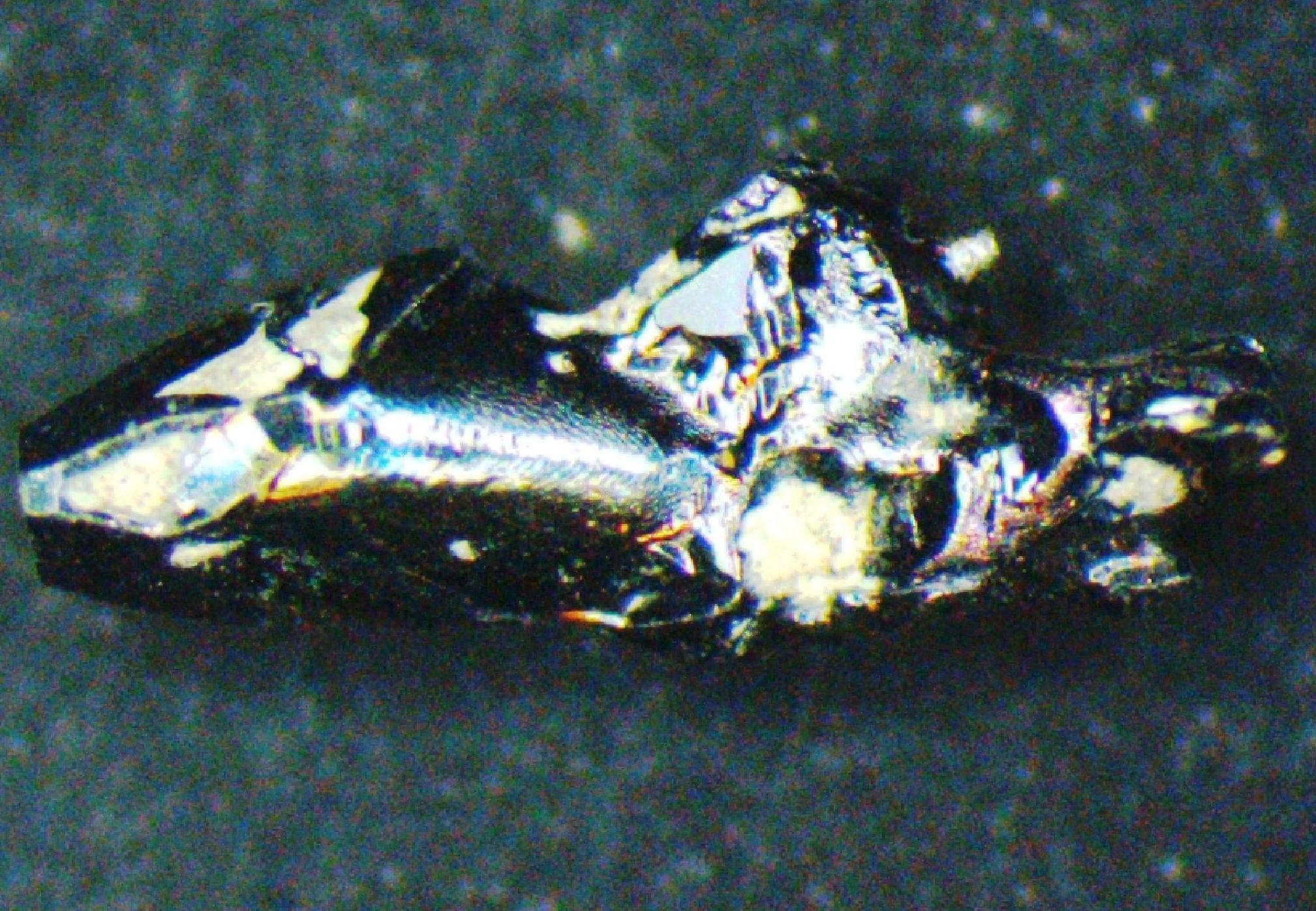 גביש מואסניט 4.1 מ"מ